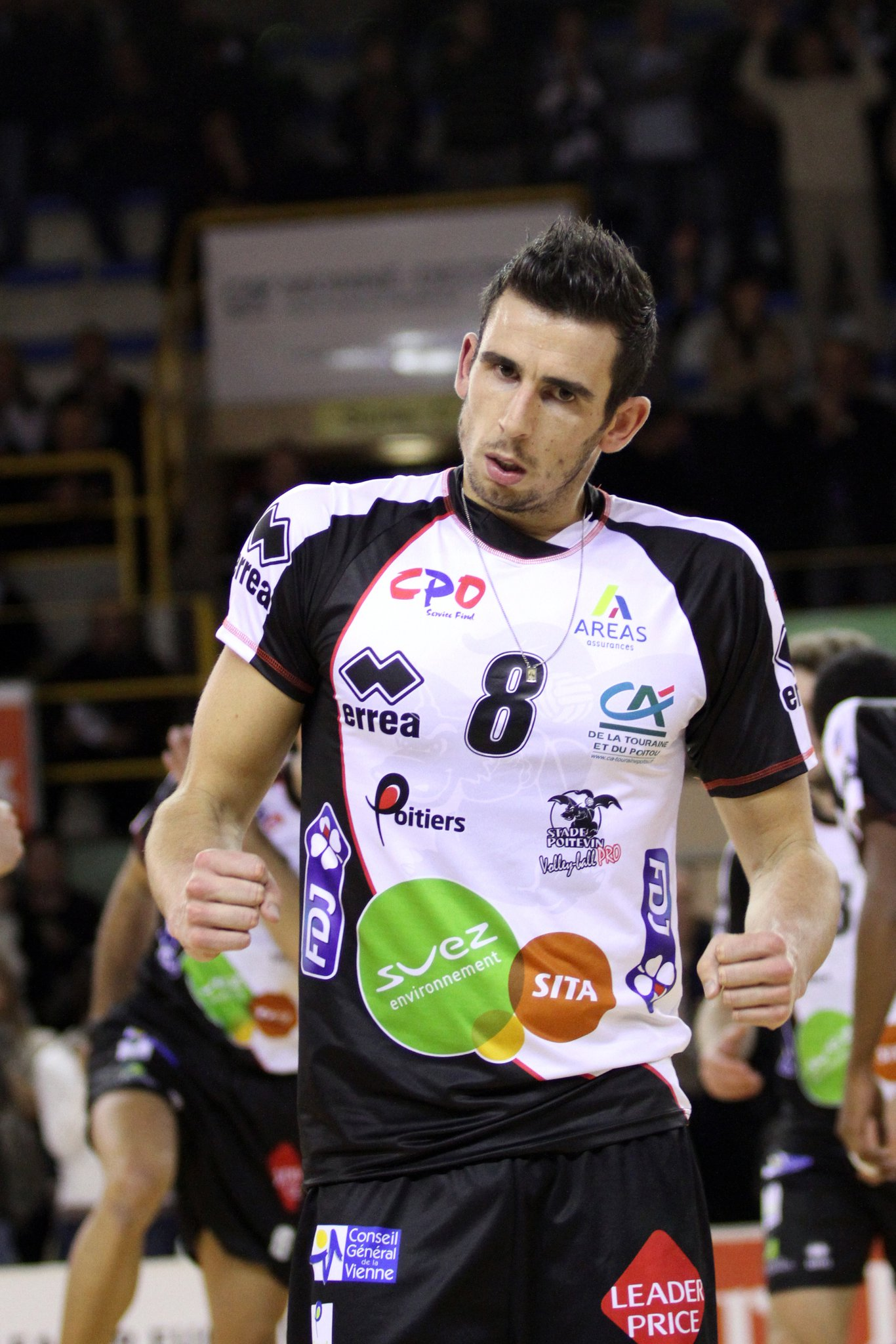 Nuno Pinheiro, joueur portugais de volley-ball professionnel.